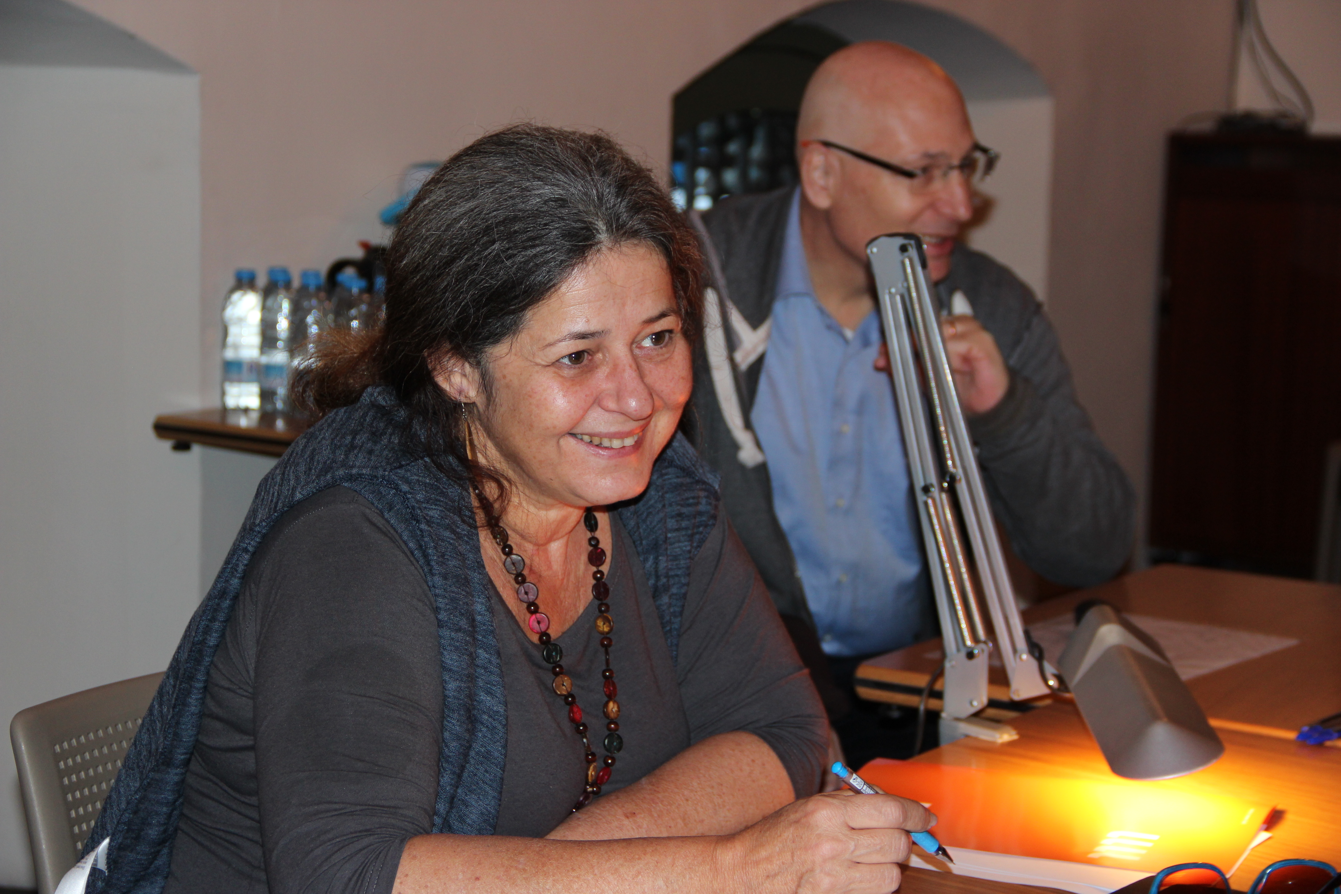 Lia Nirgad, traductora del castellà a l'hebreu